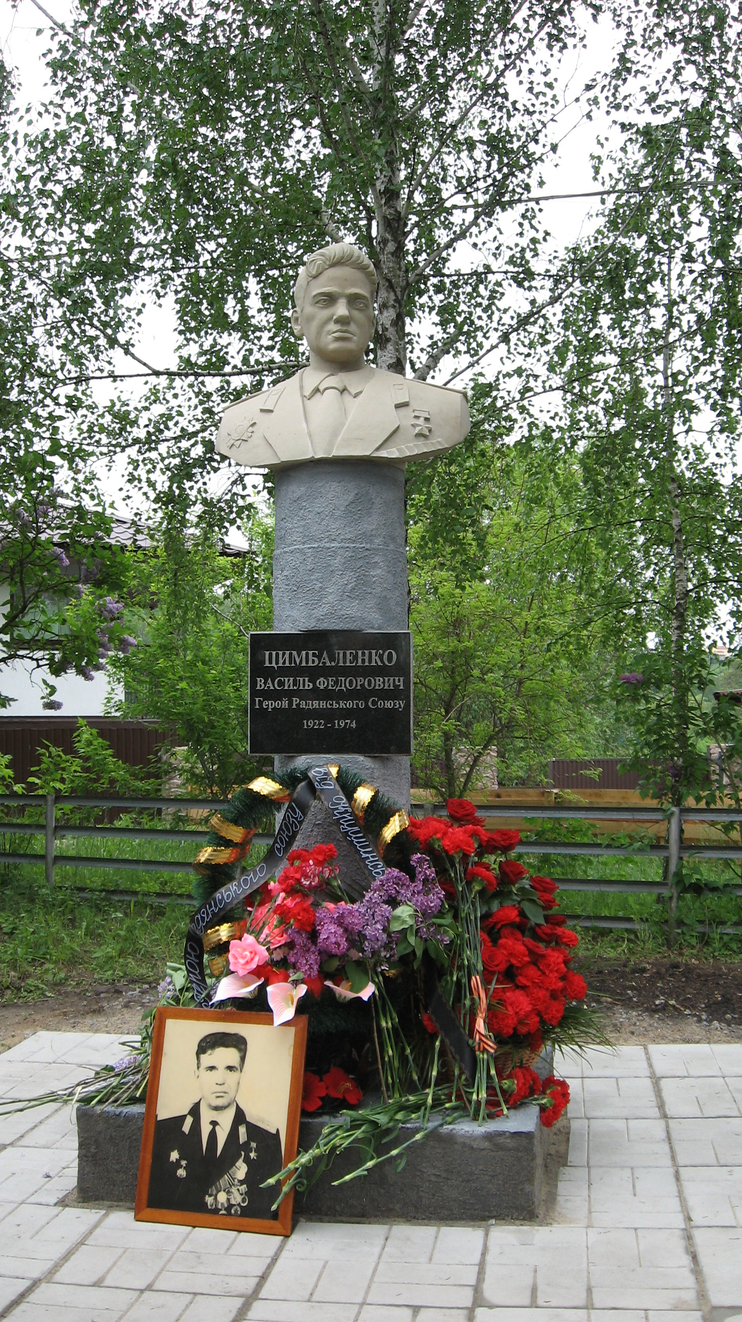 Памятник Герою Советского Союза Цымбаленко В. Ф. в селе Малая Бугаевка Васильковского района Киевской области